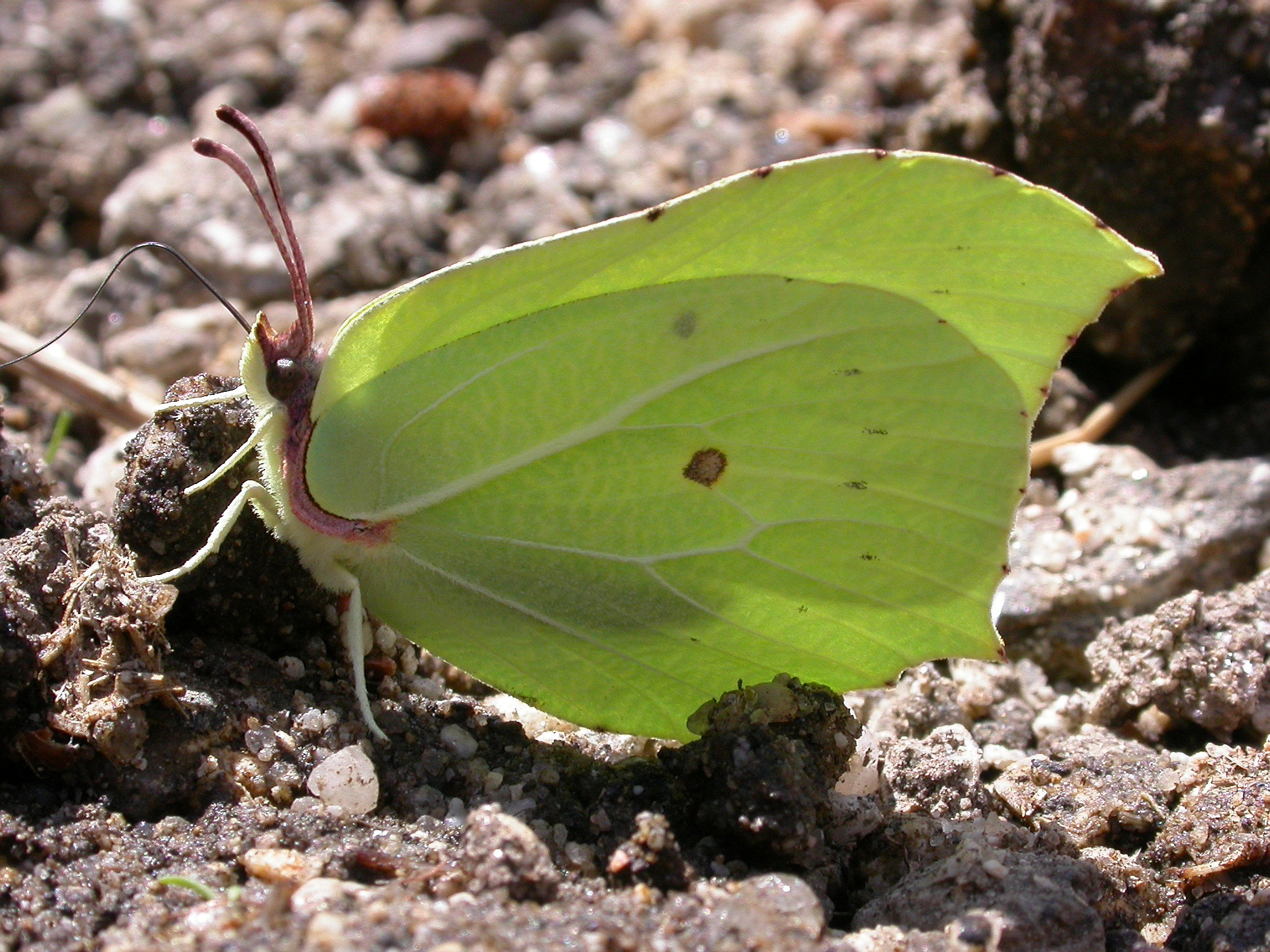 Gonepteryx rhamni (Pieridae). Hoya de San Blas, Madrid, España.